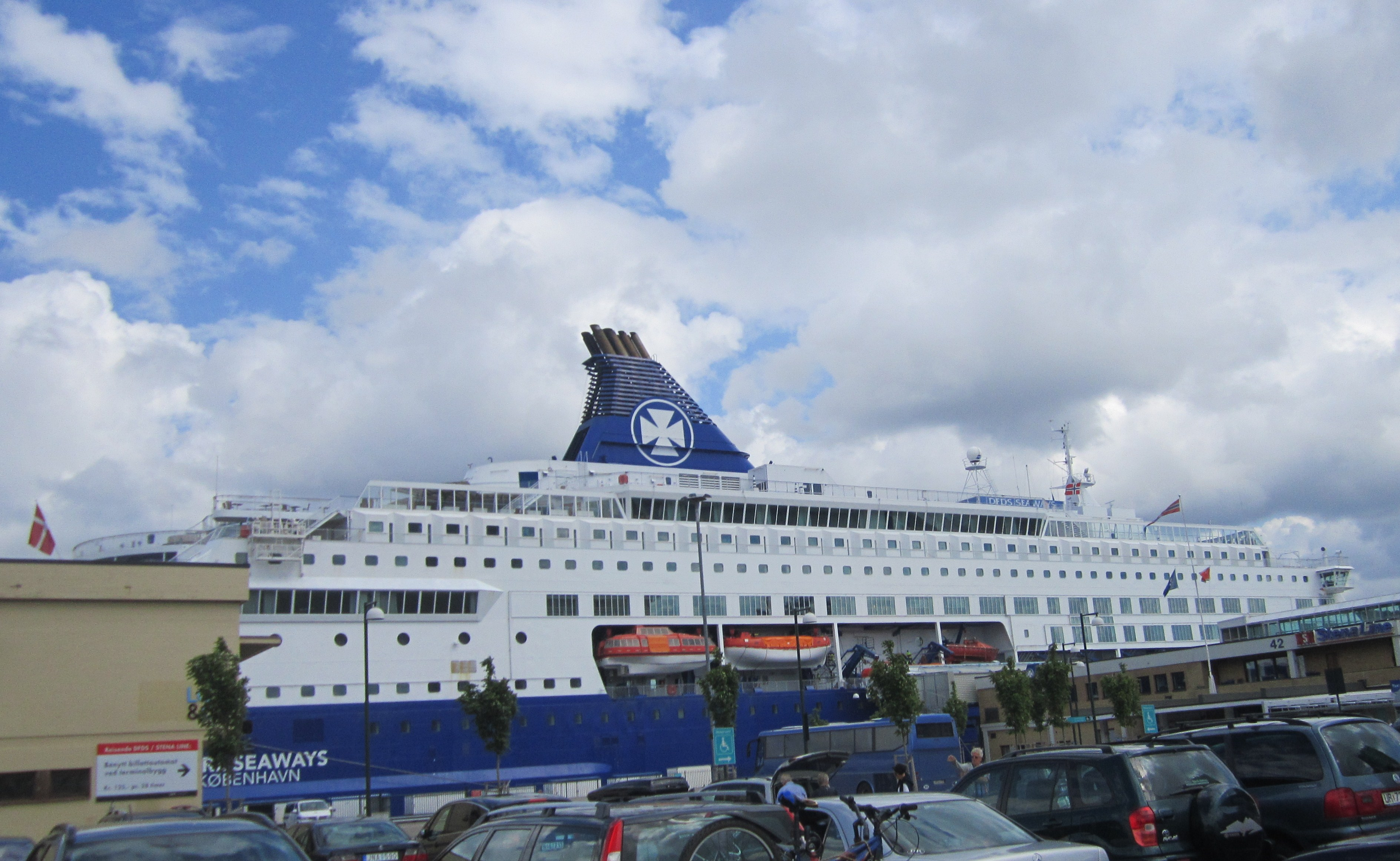 A picture of the danishboat Pearl Seaways in Oslo harbour.